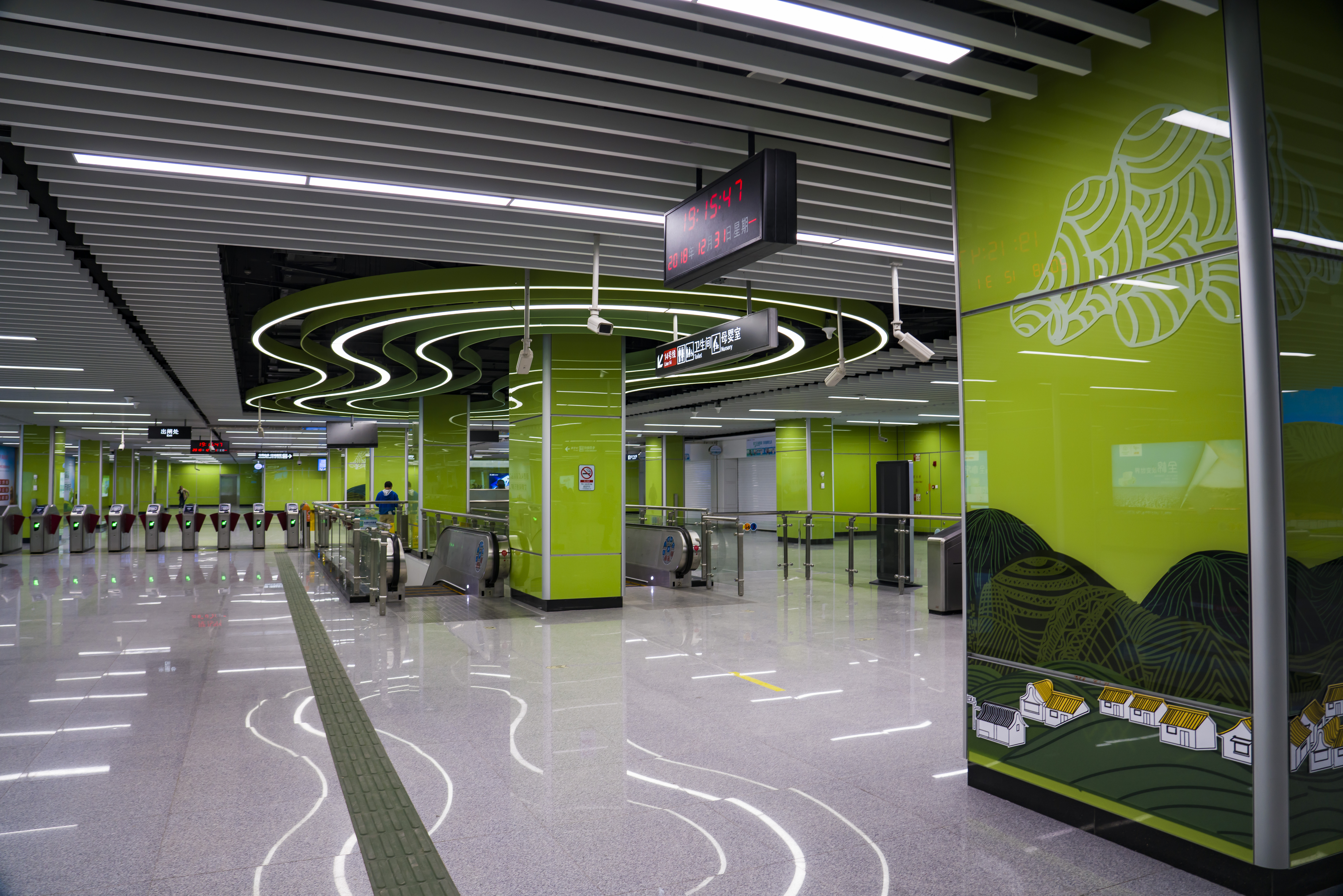 广州地铁太和站站厅